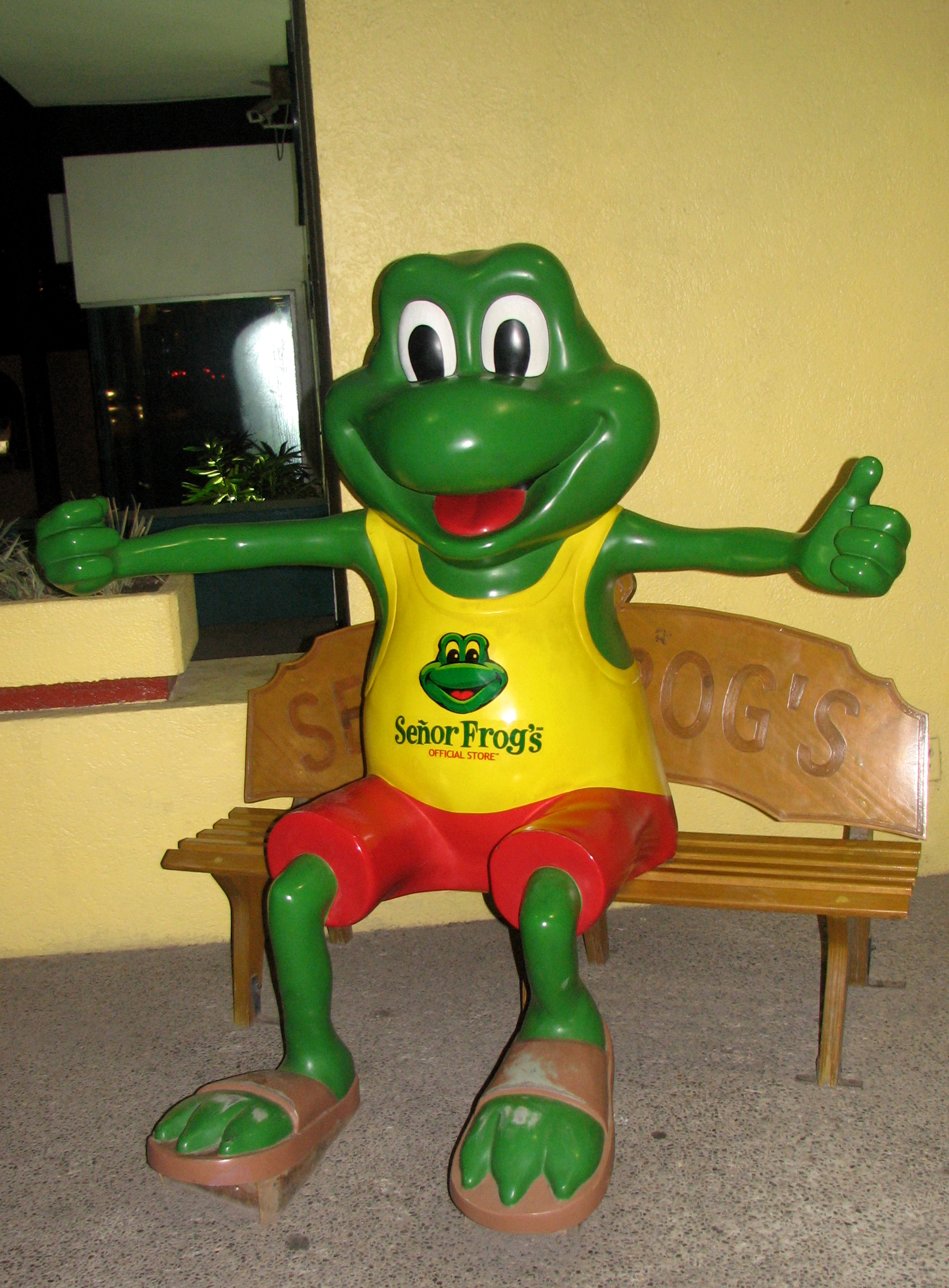 Señor Frogs en Mazatlán Sinaloa México.